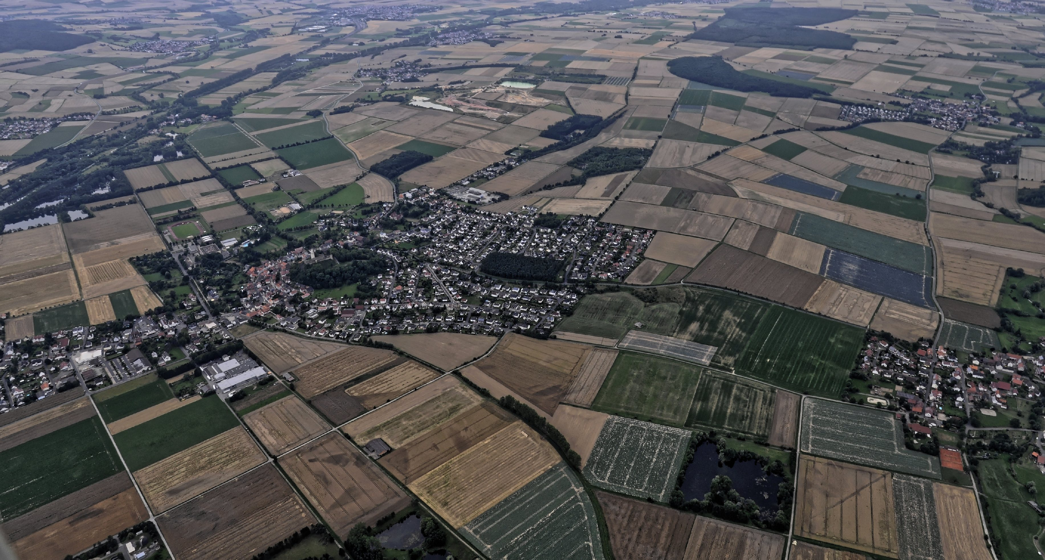 Bilder vom Flug Nordholz-Hammelburg 2015: Blick von Norden auf die Kernstadt von Felsberg im Schwalm-Eder-Kreis in Nordhessen.